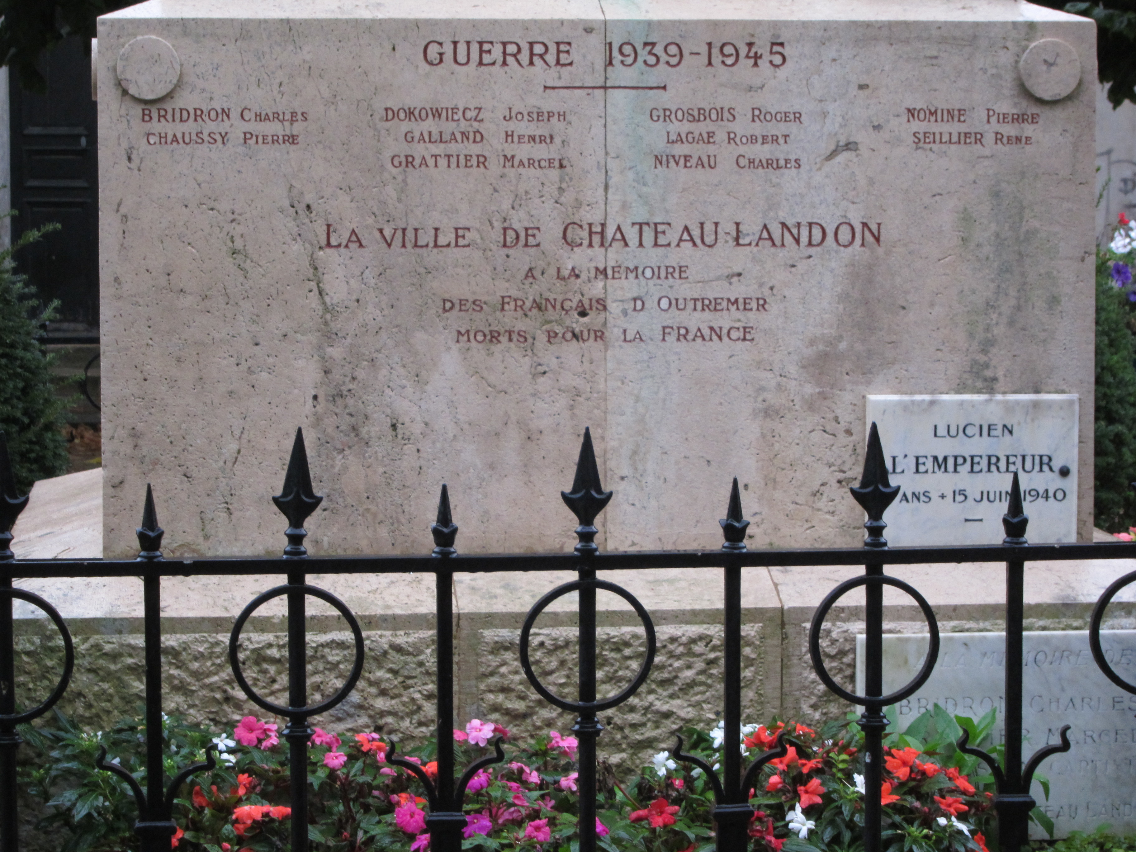 WW2 Memorial Château-Landon